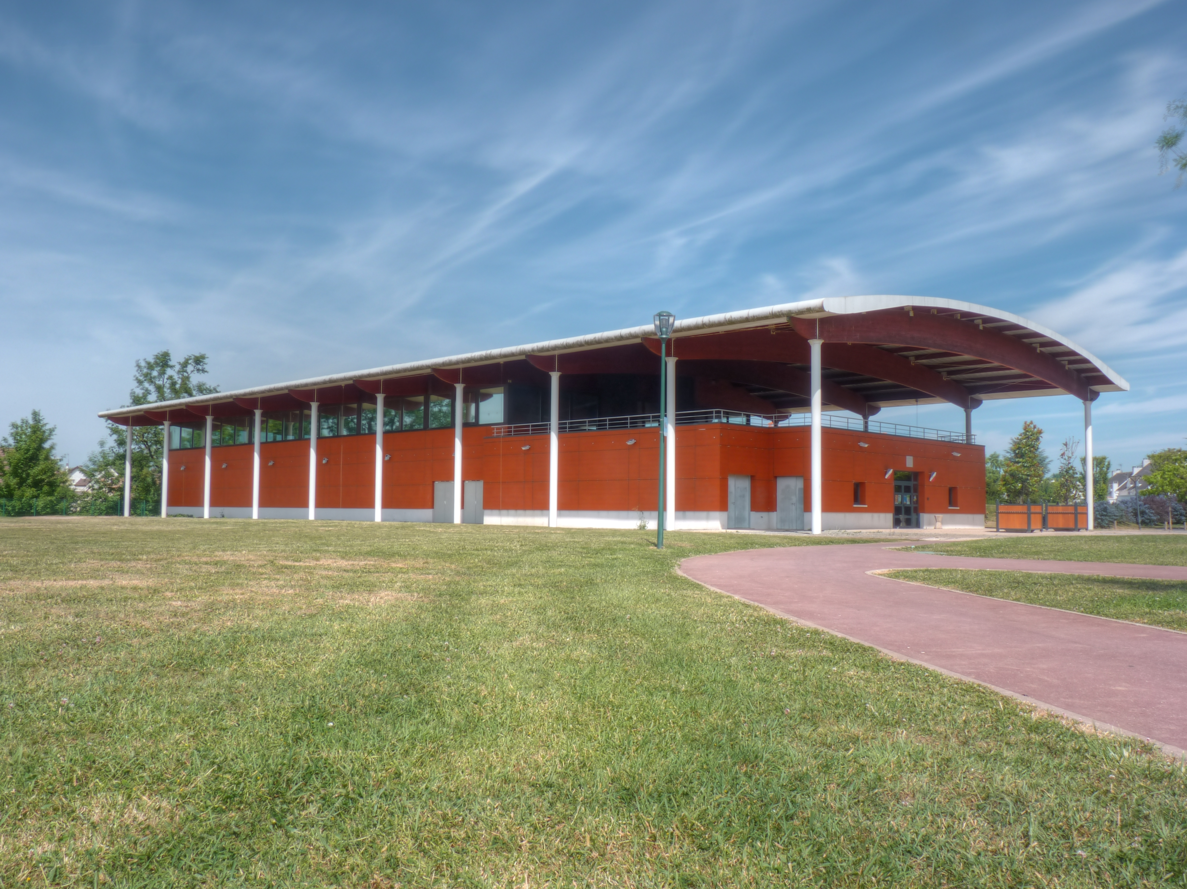 Image HDR du gymnase de la Brèche aux Loups à Ozoir-la-Ferrière.